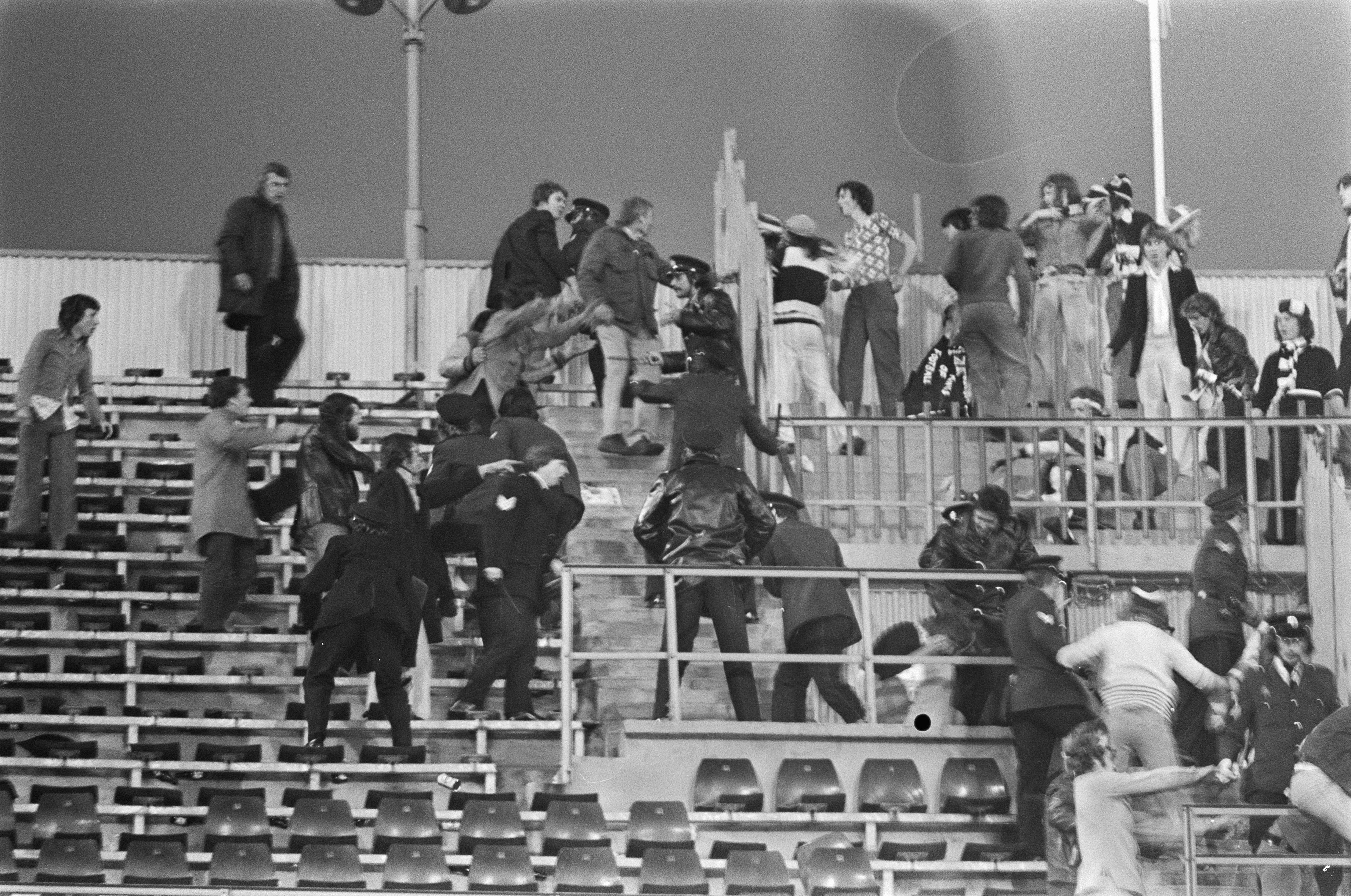 Collectie / Archief : Fotocollectie Anefo Reportage / Serie : [ onbekend ] Beschrijving : Feyenoord tegen Tottenham Hotspur 2-0, finale UEFA Cup Engelse supporters worden door politie van tribune verwijderd Datum : 29 mei 1974 Trefwoorden : POLITIE, SUPPORTERS, finales, sport, tribunes, voetbal Instellingsnaam : Feyenoord, Tottenham Hotspur, UEFA Cup Fotograaf : Mieremet, Rob / Anefo Auteursrechthebbende : Nationaal Archief Materiaalsoort : Negatief (zwart/wit) Nummer archiefinventaris : bekijk toegang 2.24.01.05 Bestanddeelnummer : 927-2220